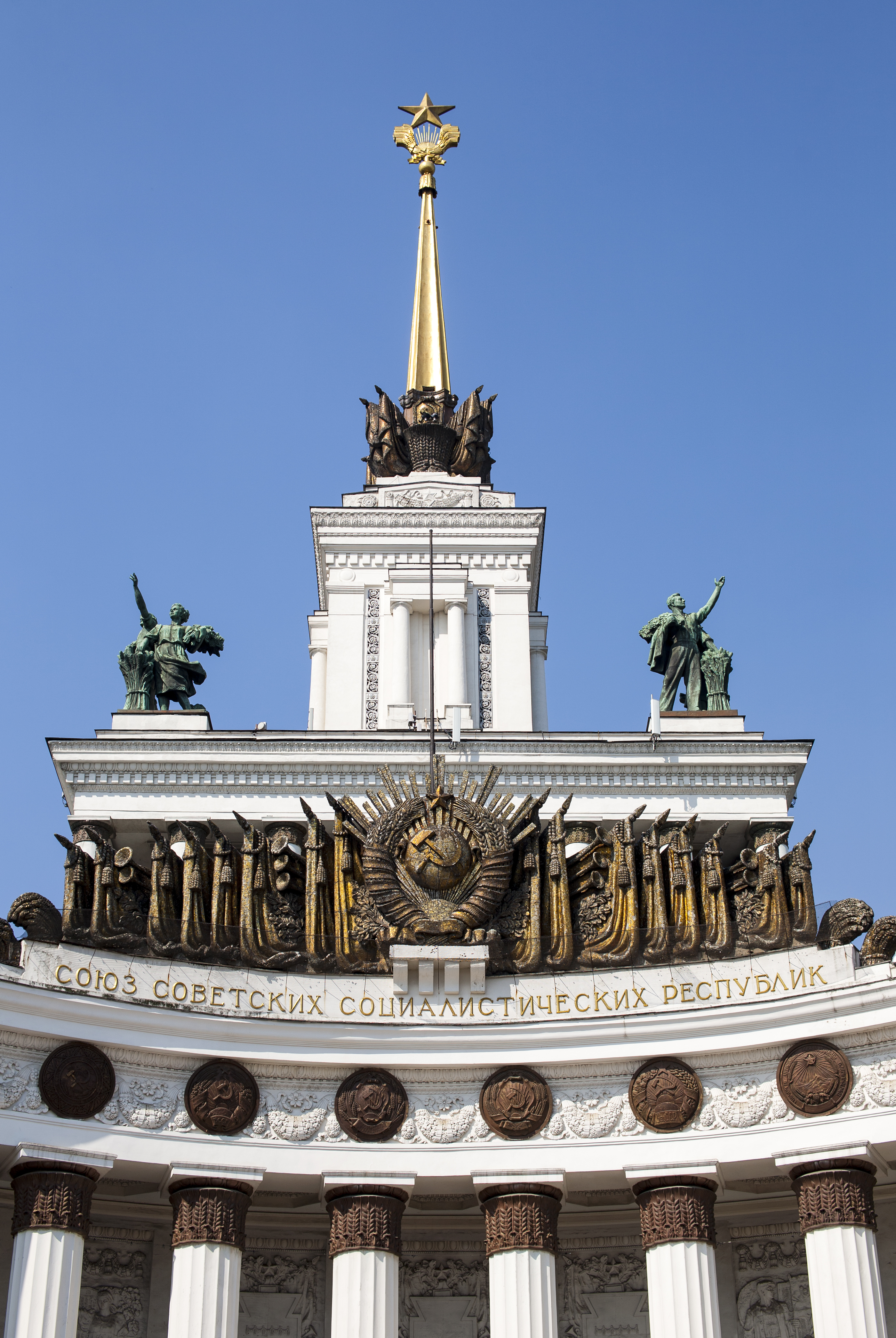 Территория Выставки достижений народного хозяйства. Вид на павильон №1 («Центральный»). Павильон №1 («Центральный») построен в 1954 году по проекту архитекторов Ю. В. Щуко и Е. В. Столярова. Памятник истории и культуры государственного значения.